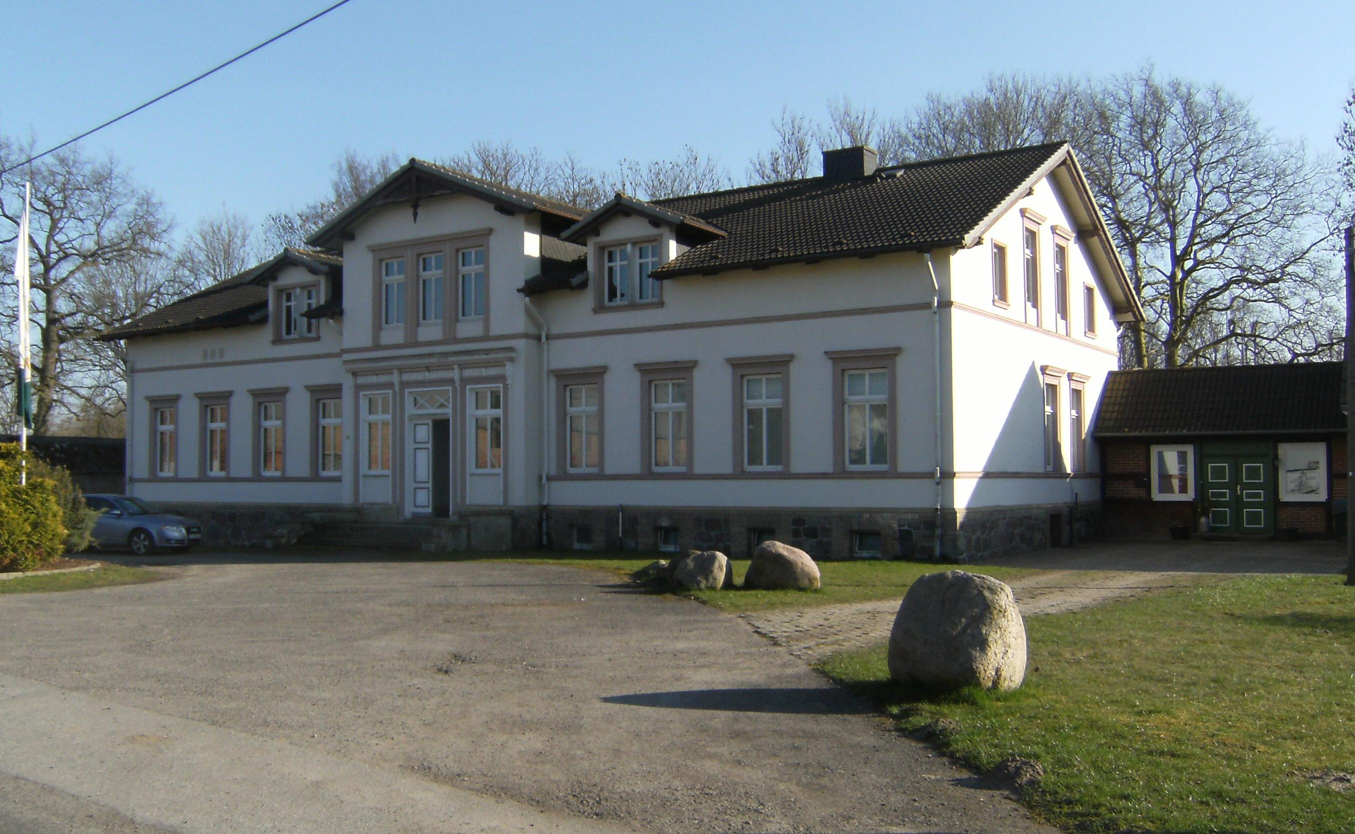 Gutshaus Neuendorf 2009